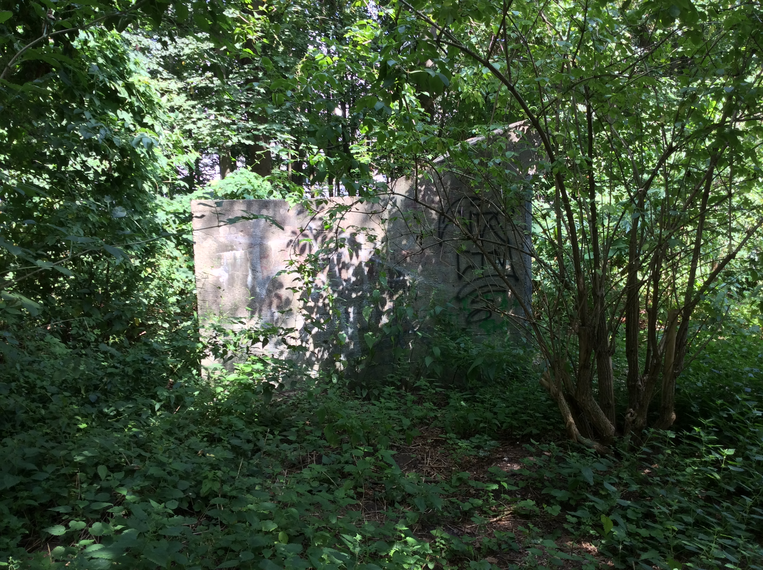 Reste eines Eingangs zu einem Bunker unter dem Eckernförder Platz.